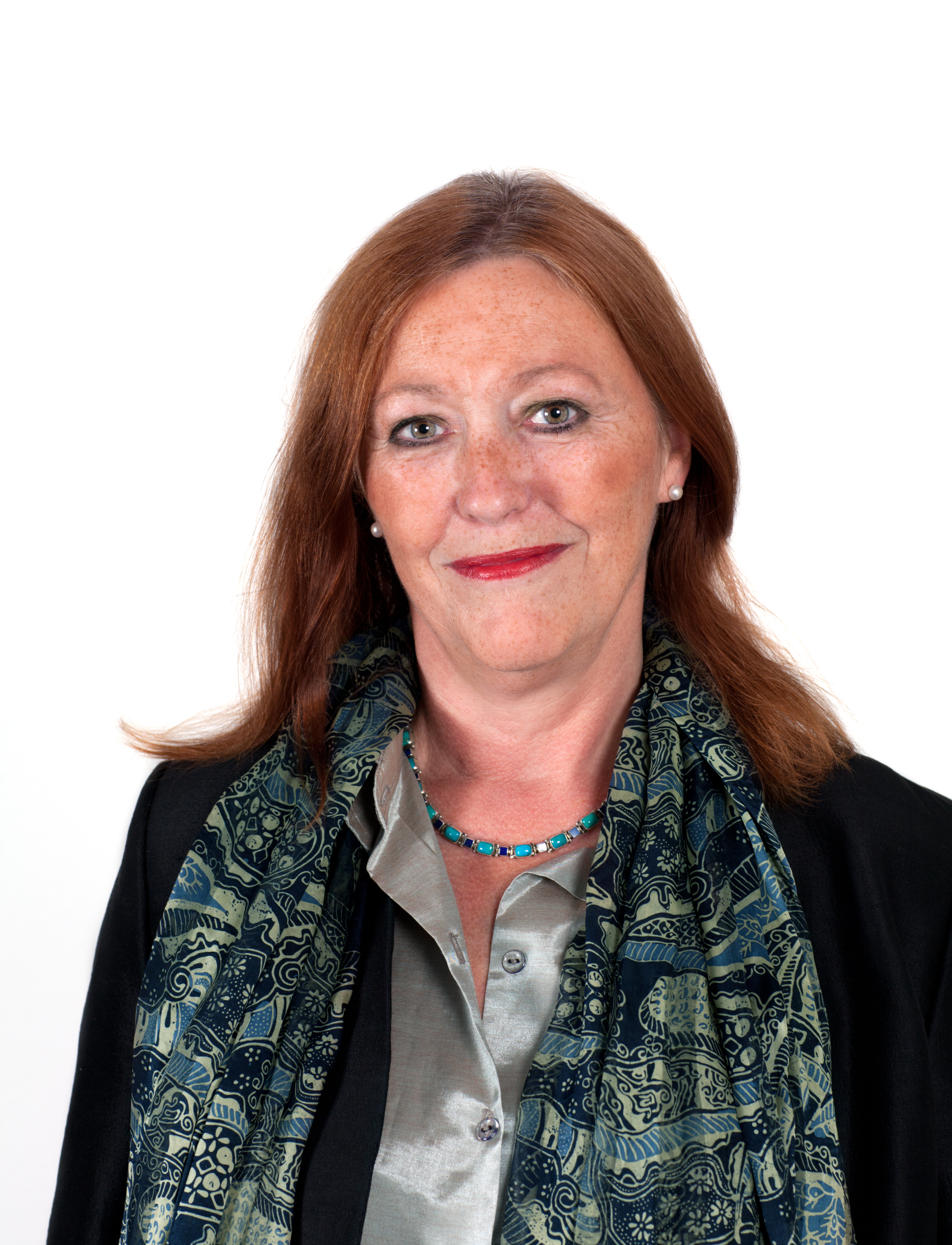 Poträtfoto von Annegret Krischok (SPD), Mitglied der 20. Hamburgischen Bürgerschaft. Während des Projektes Hamburgische Bürgerschaft im Hamburger Rathaus.